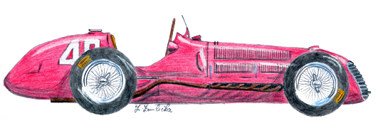 Ferrari 125 (kresba ).